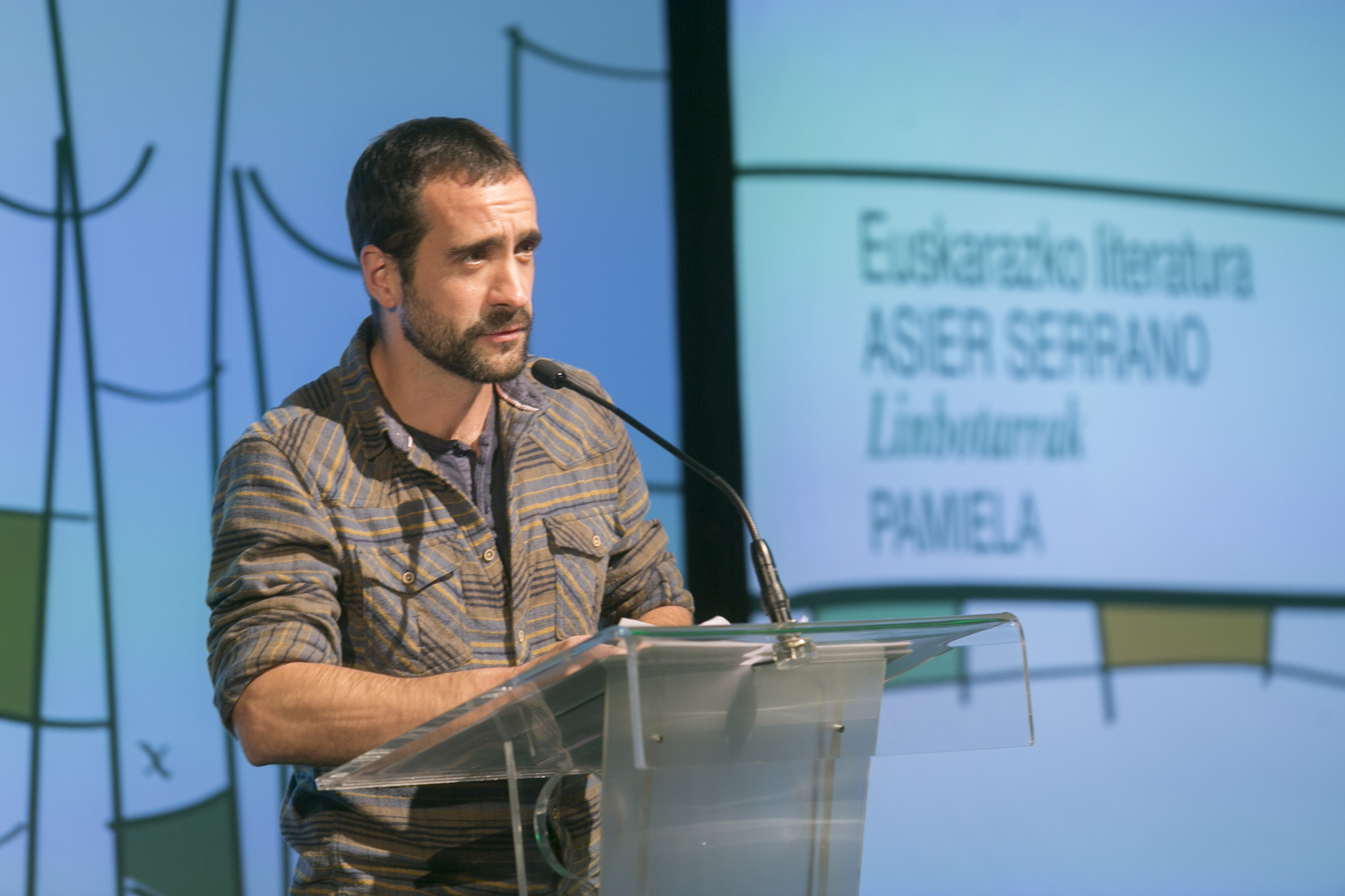 El Lehendakari Iñigo Urkullu ha presidido hoy la gala de entrega de los Premios Euskadi de Literatura, un acto que ha tenido lugar en Azkuna Zentroa de Bilbao y en el que, por parte del Gobierno Vasco, ha participado también el consejero de Cultura y Política Lingüística, Bingen Zupiria. Al acto han asistido los siete premiados de la presente edición: Asier Serrano, en la modalidad de Literatura en Euskera; Fernando Aramburu, en la de Literatura en Castellano; Arantxa Urretabizkaia, Ensayo en Euskera; Ander Izagirre, Ensayo en Castellano; Leire Bilbao, Literatura Infantil y Juvenil; Mikel Valverde, en la modalidad de Ilustración de Obra Literaria; y, por último, Matías Múgica, Traducción de Obra Literaria en Euskera.